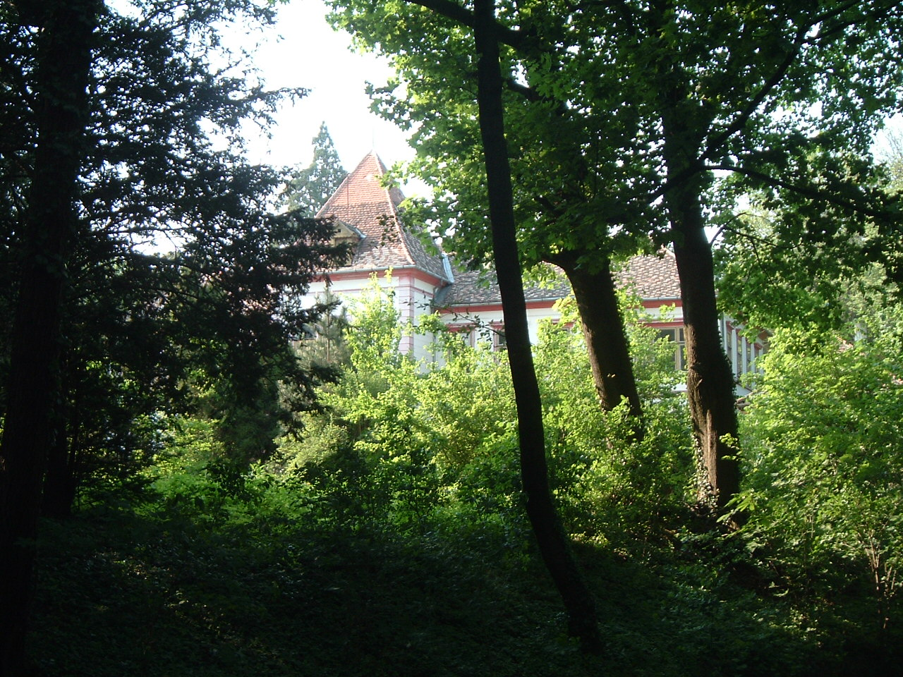 Gencsapáti, Széchenyi courthouse